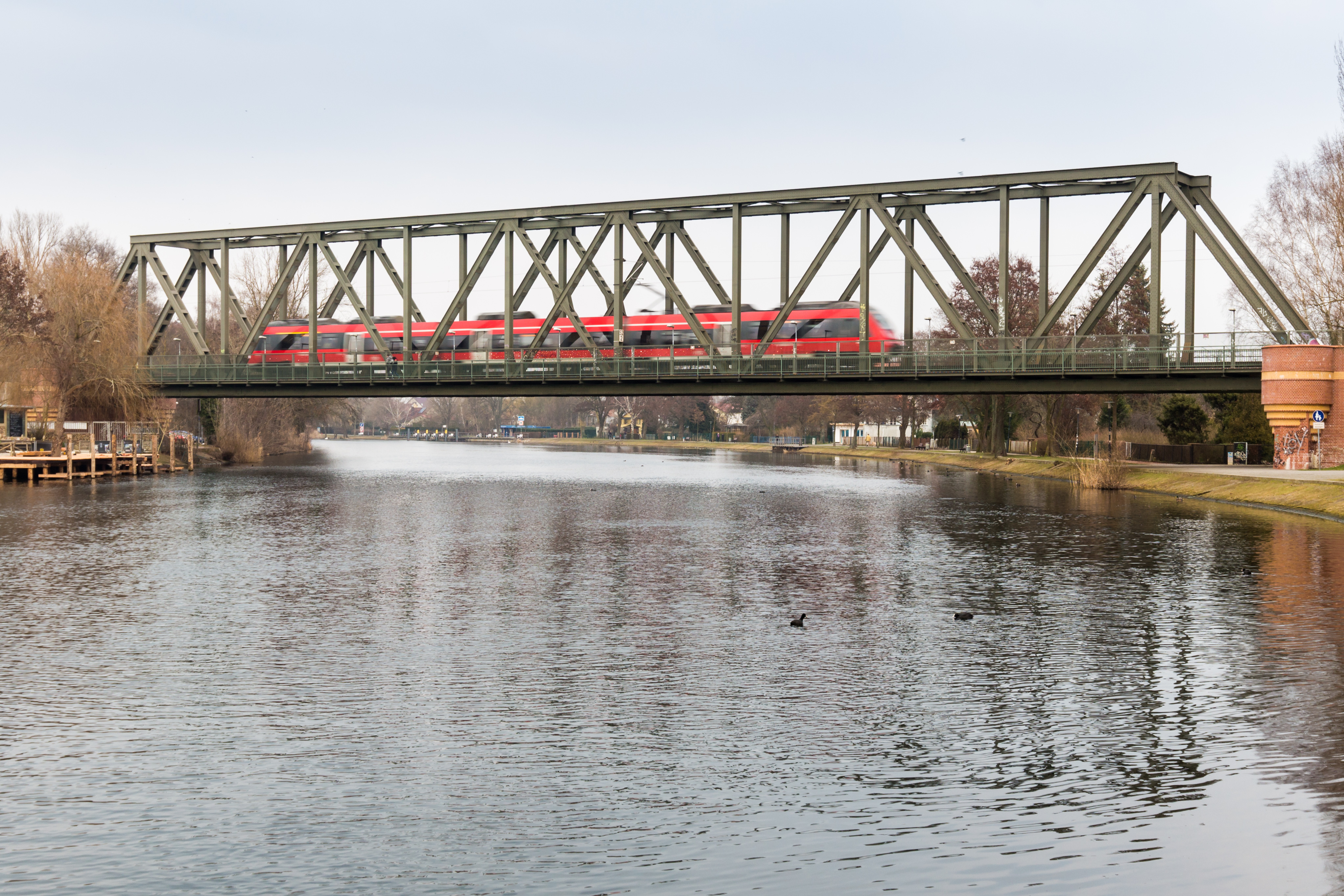 Eine Regionalbahn der Baureihe 442 überquert die Havelbrücke in Caputh.